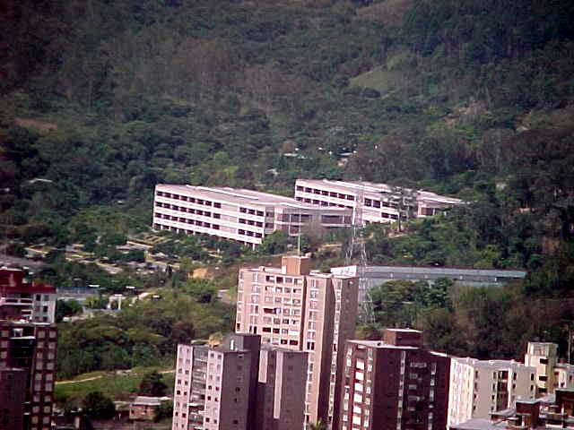 Los Teques, Estado Miranda - venezuela (2000)